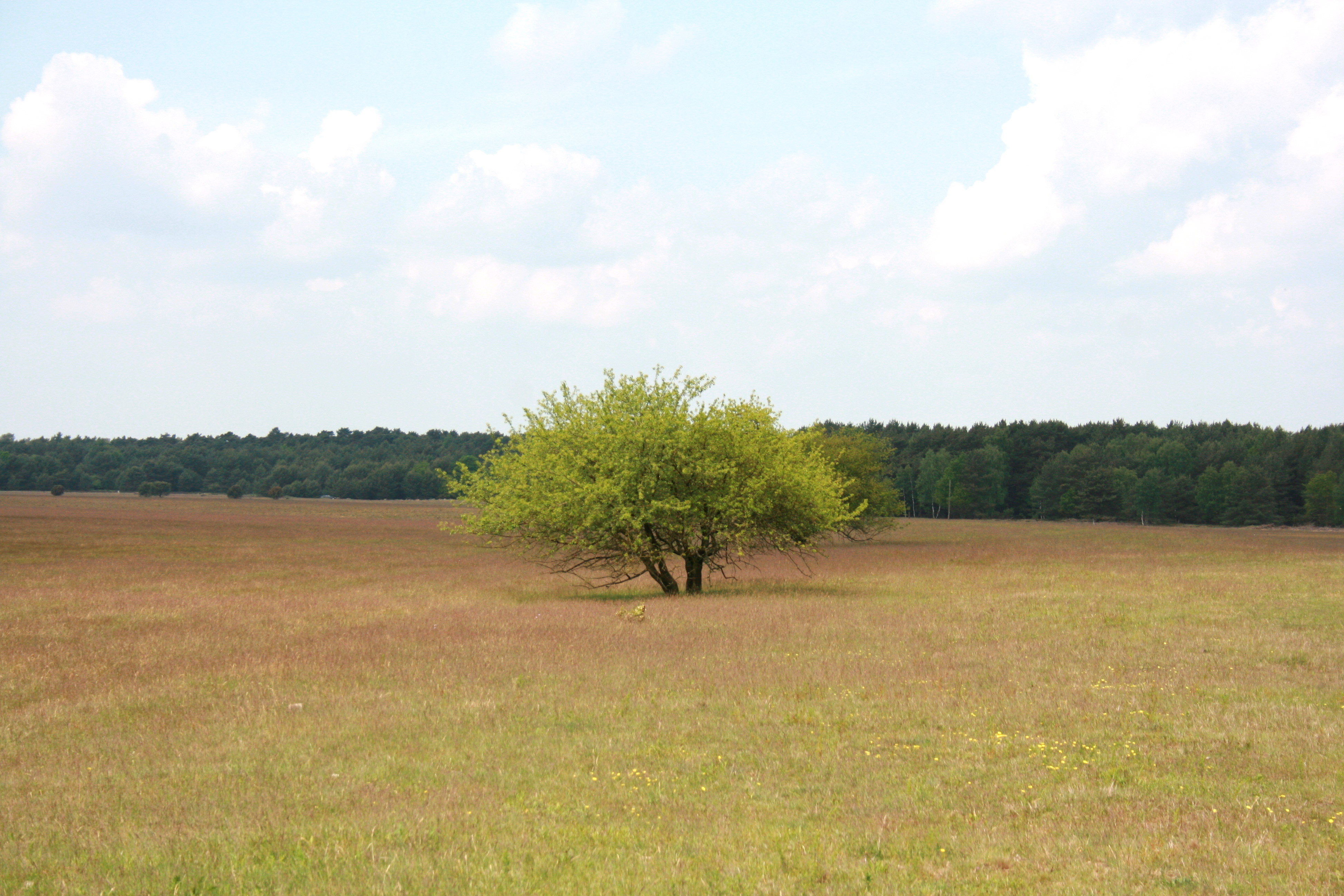 Camp Reinsehlen in Schneverdingen